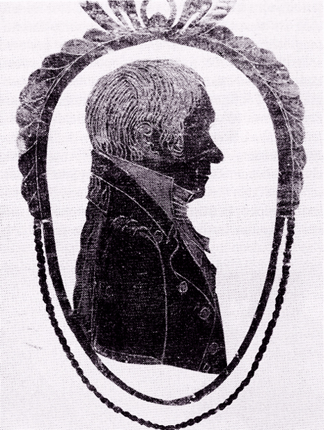 Pastor Bernhard Möllmann Menslager Lesegesellschaft Scan eines Fotos eines um 1818 entstanden Scherenschnitts des Silhouetteurs Johann Caspar Dilly